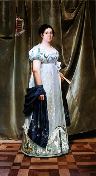 Retrato de la heroína aragonesa María de la Consolación Azlor (1773-1814), más conocida por su título de condesa de Bureta.